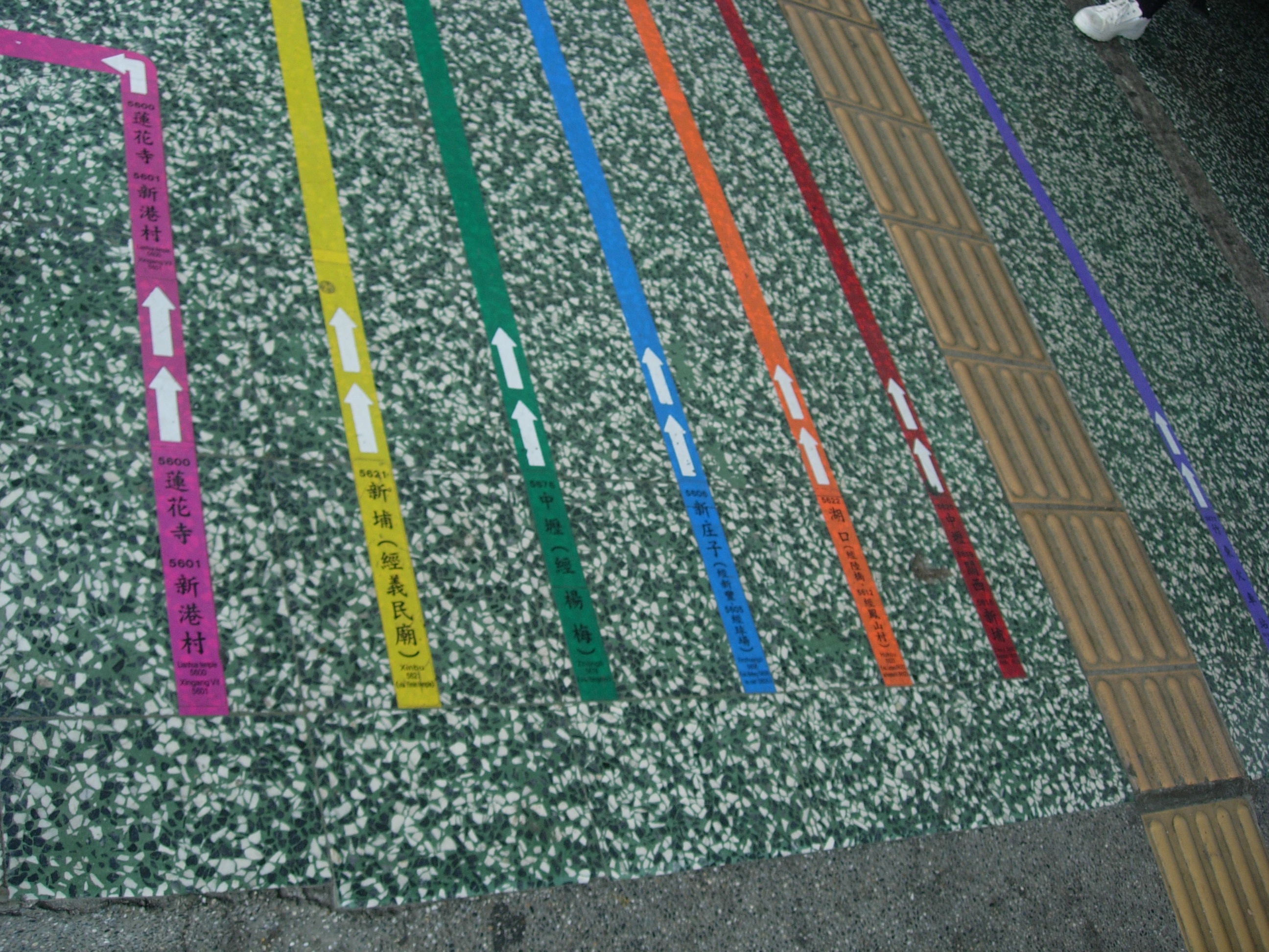 中文（台灣）: 新竹客運新竹北站地面